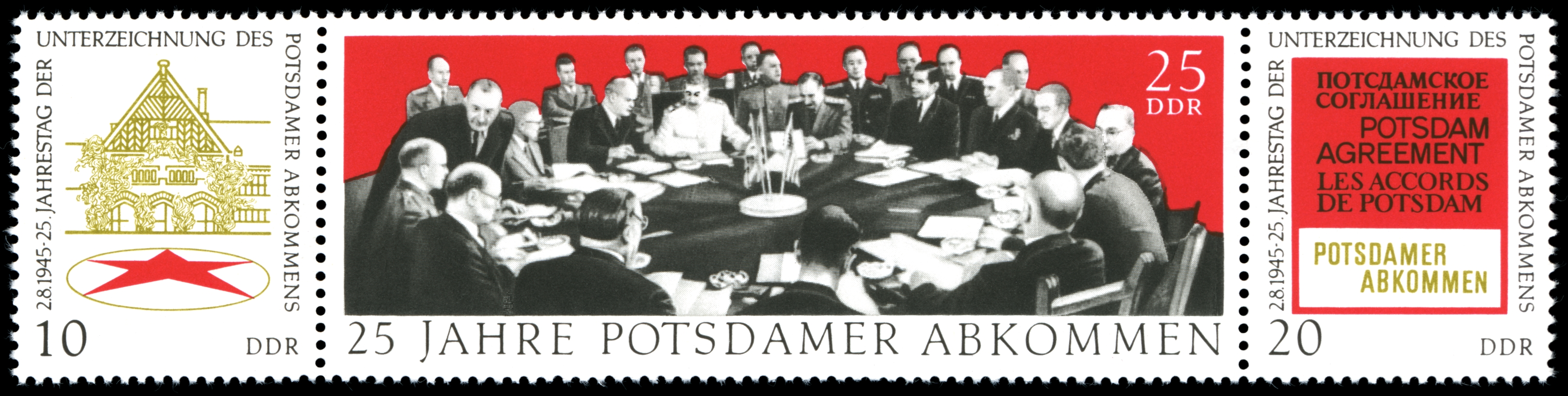 Information: 25. Jahrestag der der Unterzeichnung des Potsdamer Abkommens Ausgabepreis: 10+20+25 Pfennig First Day of Issue / Erstausgabetag: 28. Juli 1970 Auflage: 4.000.000 Entwurf: Bernd Steinwendner Druckverfahren: Offsetdruck Michel-Katalog-Nr: Ländercode-MiNr: 1598-1600